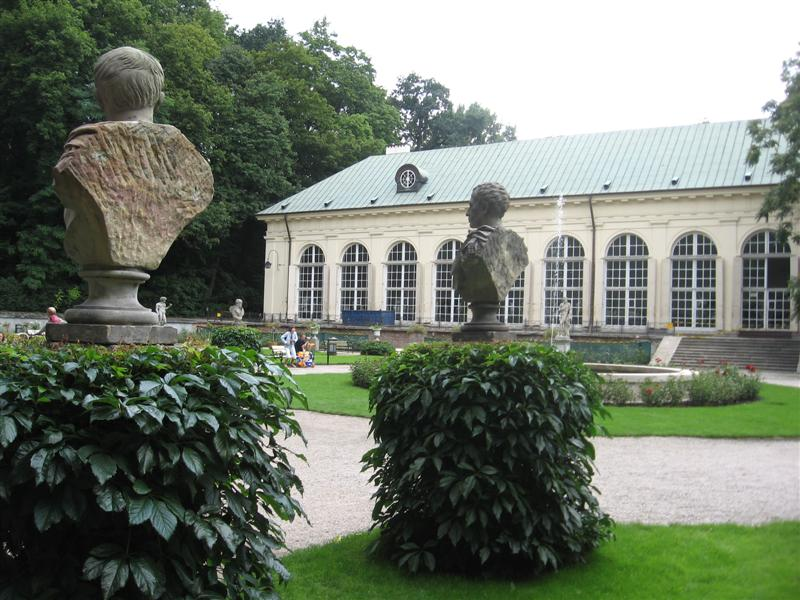 Stara Pomarańczarnia - Busts and garden - in Warsaw - Poland